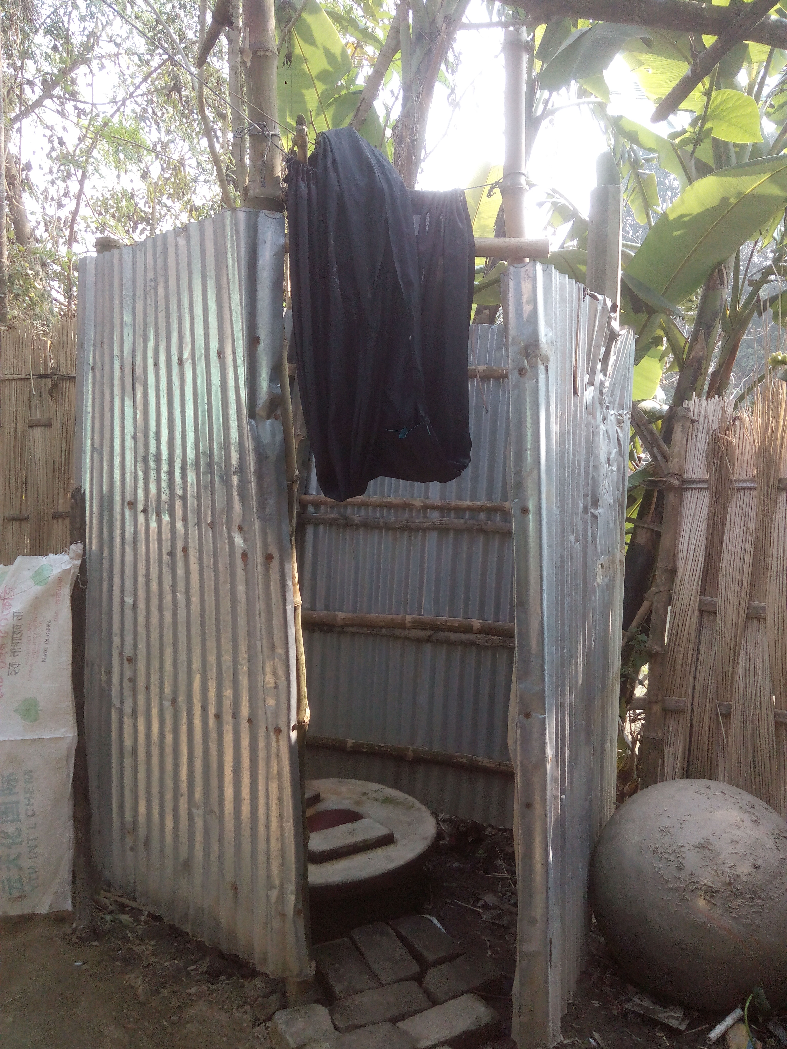 তাড়াশ উপজেলার একটি টয়লেট৷